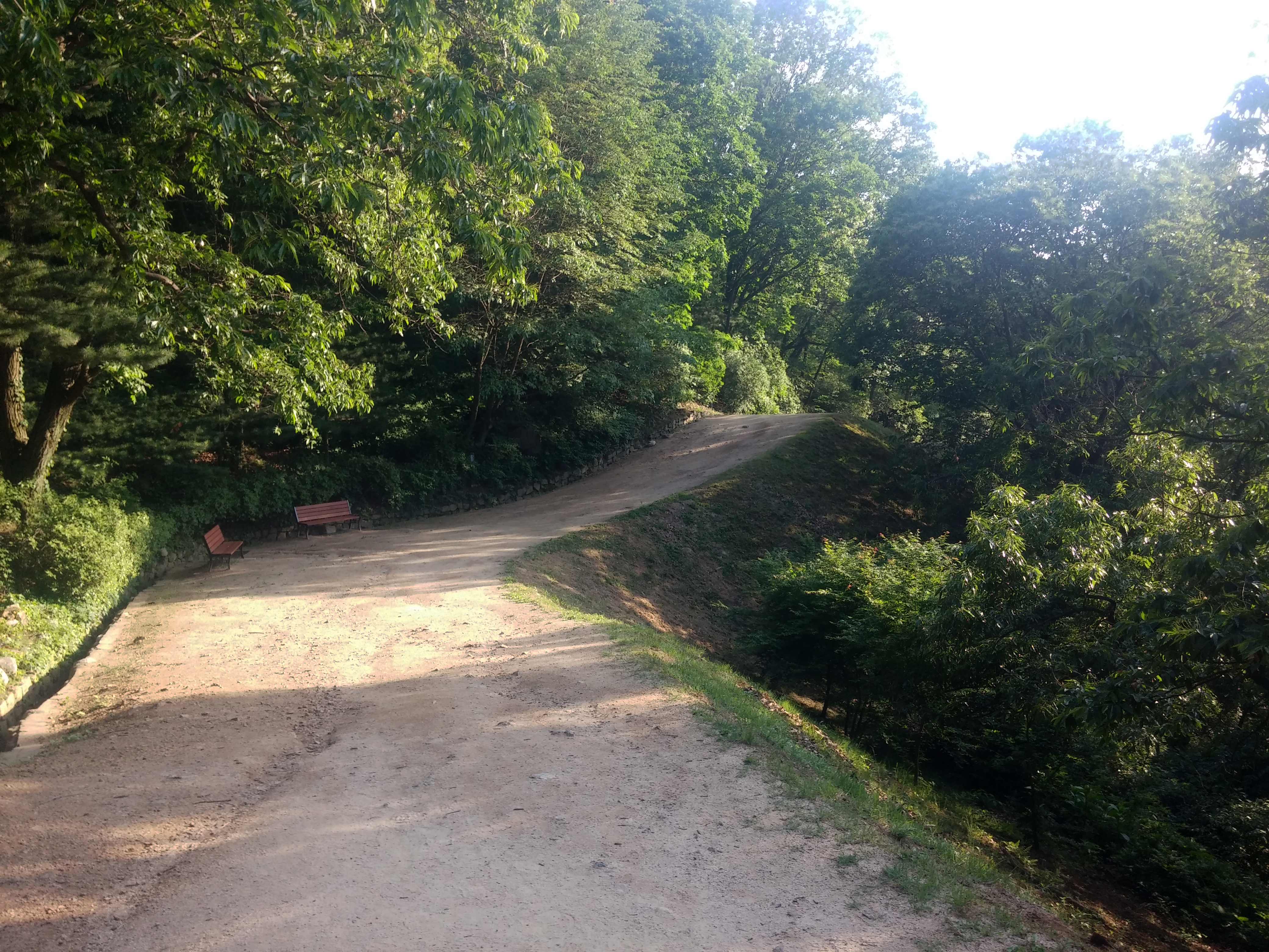 복원된 행주산성 토성